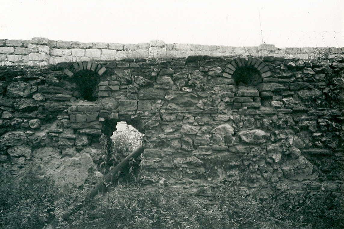 залишки монастирського муру з південної сторони.